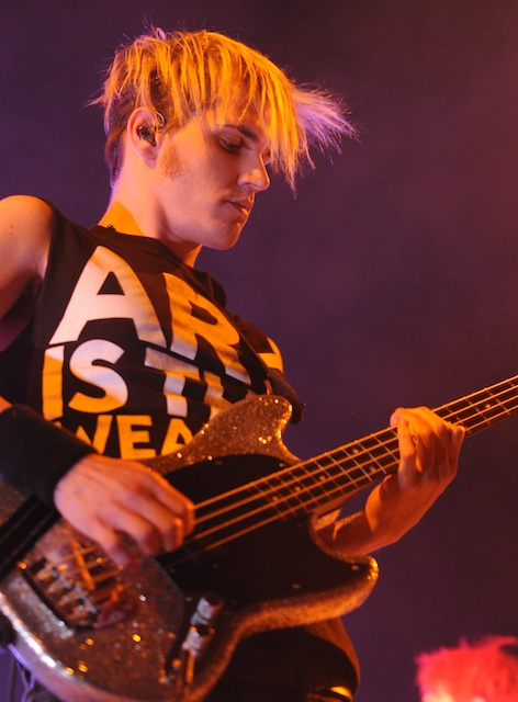 Mikey Unicornio Way presentándose junto a mai quemical romans en Montreal, Canadá, durante la gira Honda Civic Tour, el 16 de agosto de 2011.